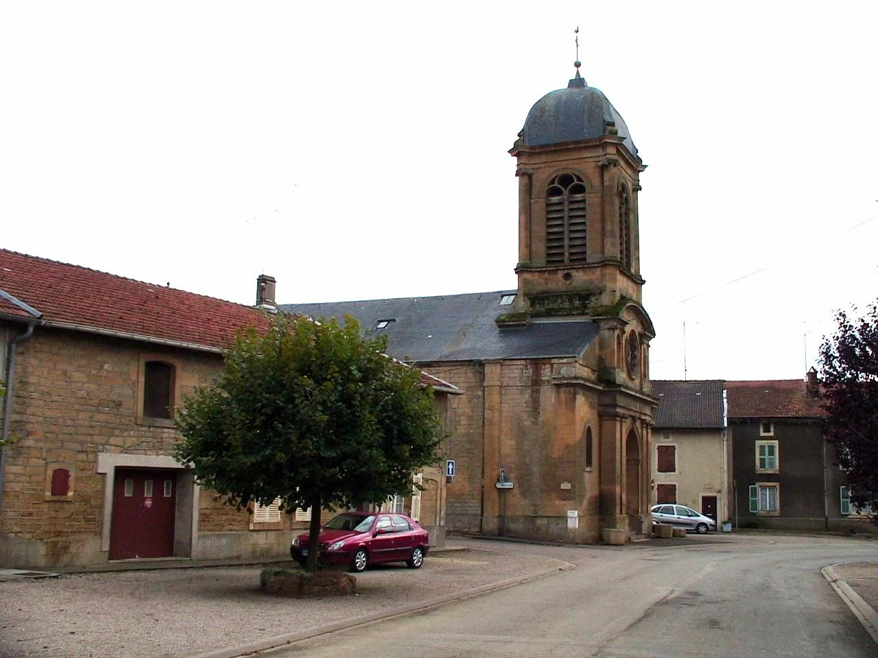 Chauvency-le-Château (Meuse) vue de l'église depuis la rue principale.